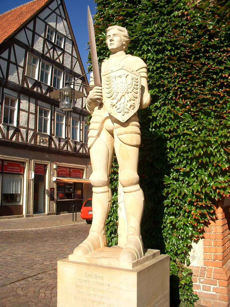 Roland (Nachbildung) vor dem Rathaus in Gardelegen.